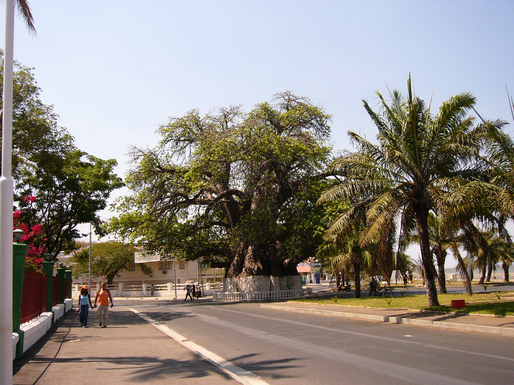 Boabab in Mahajanga